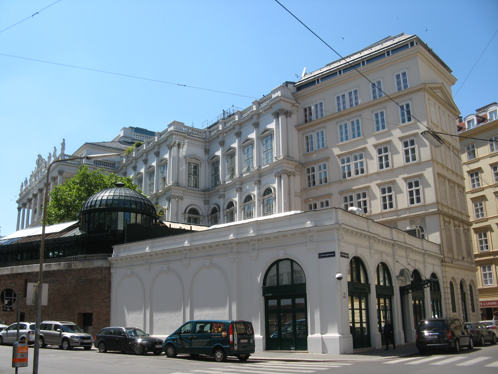 Coburgbastei von der Liebenberggasse aus gesehen, Wien-Innere Stadt